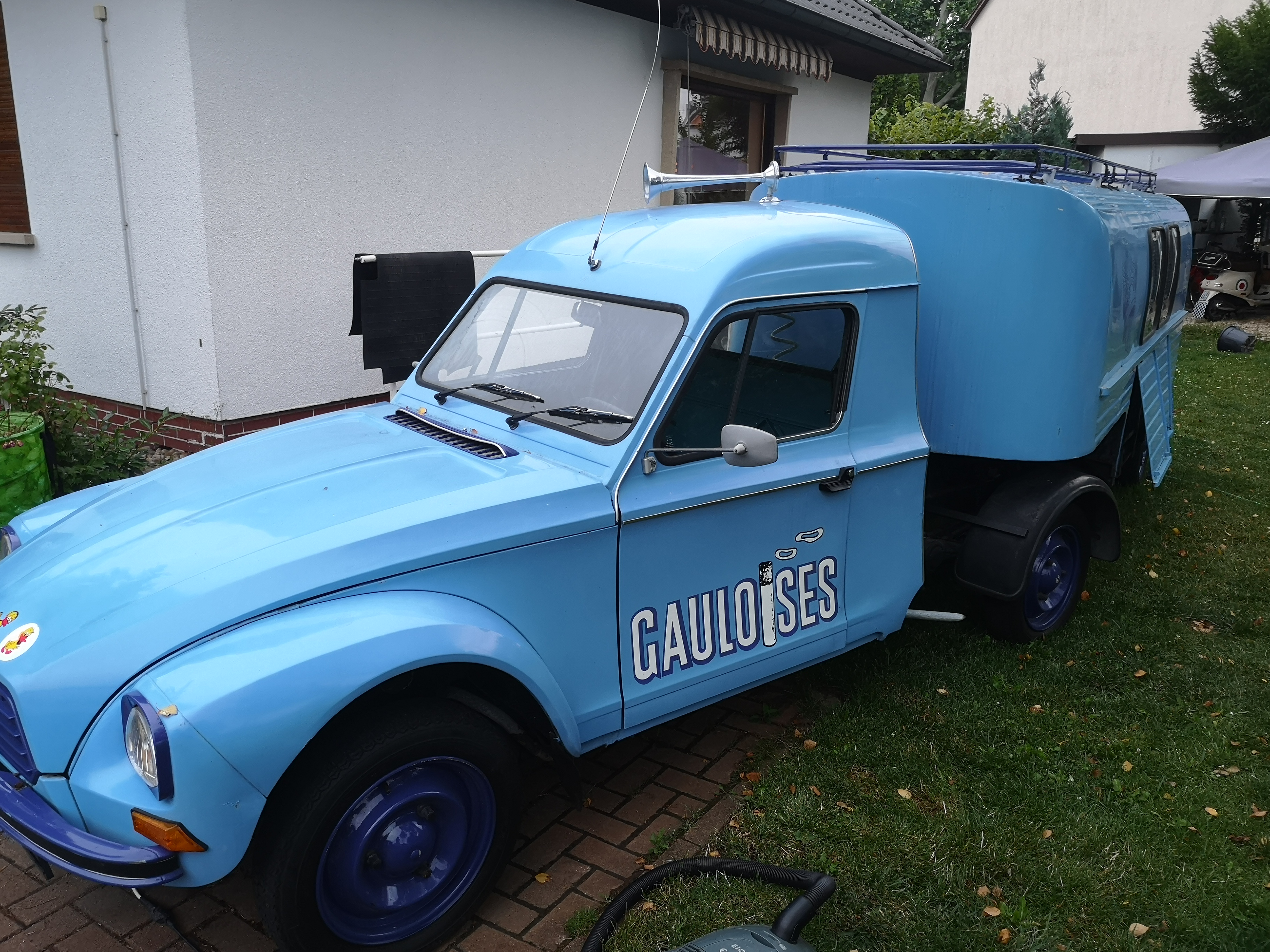 Gauloises Enten Truck